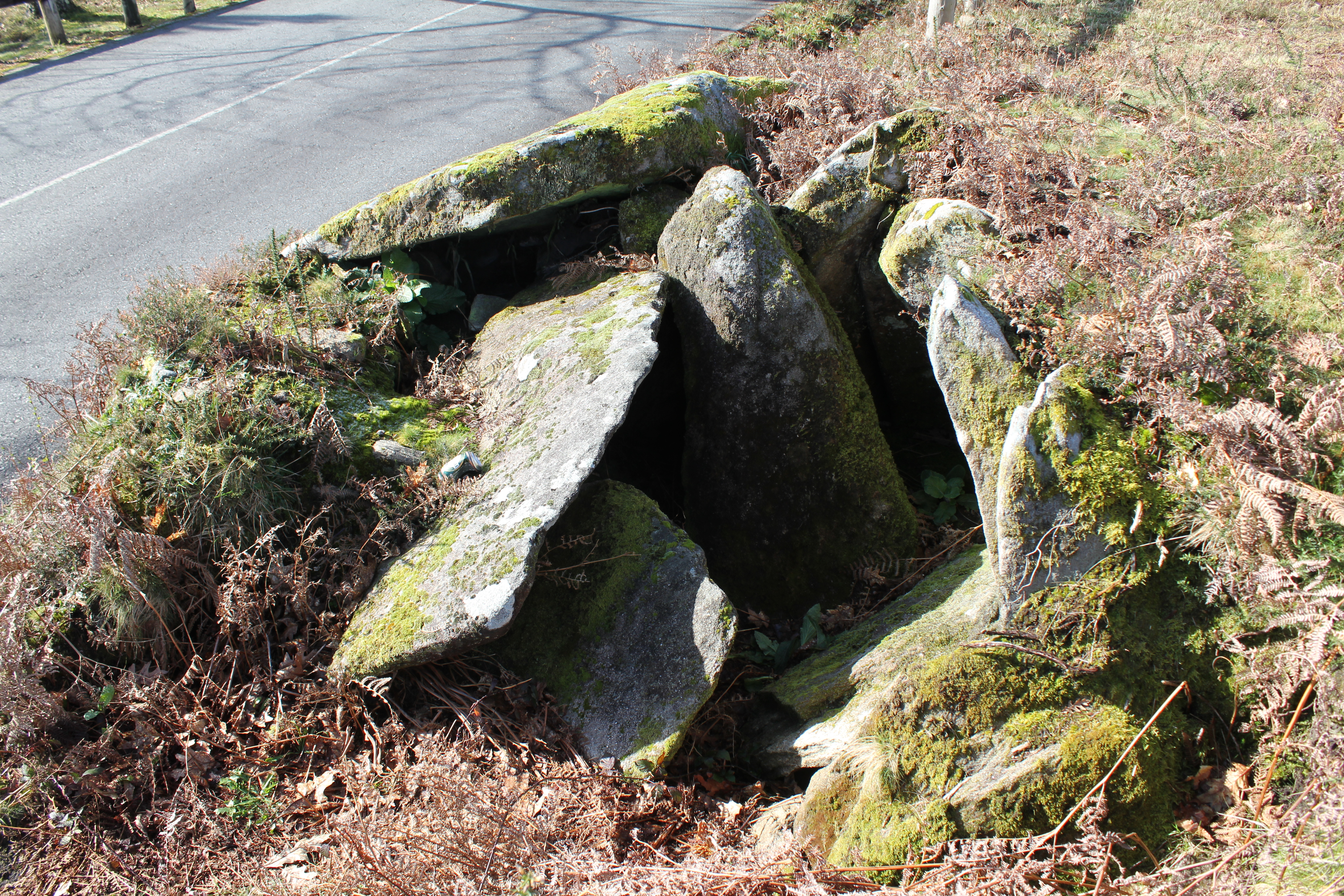 Cámara megalítica en Marín, moi desfeita pola construcción dunha estrada. Foto do ano 2013.